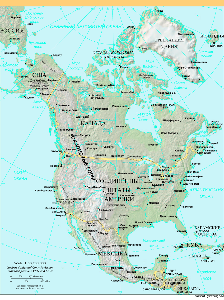 ЦРУ'шная карта Северной Америки, русифицированая Карта (исходный английский вариант) взята с сайта ЦРУ. По сведениям английской Википедии, все материалы американских правительственных агентств — Public Domain. Я, Begemotv2718, перевел все названия на русский. В качестве справочника по переводу использовались: БСЭ Справочник кодов городов БТК Англо-русский словарь Мюллера, в общем-то редко